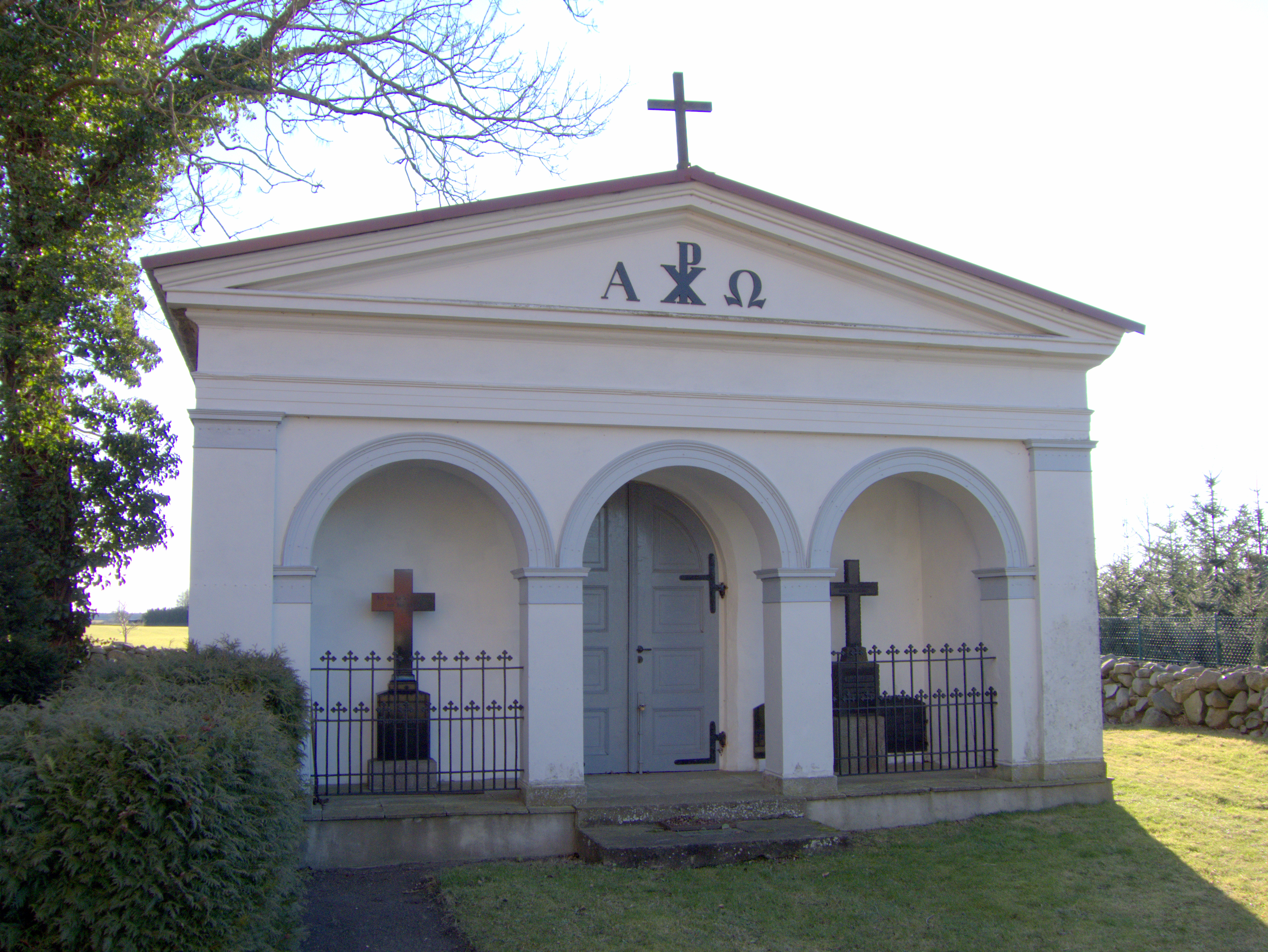 Mausoleum in Pensin, Nordseite mit Eingangsvorhalle